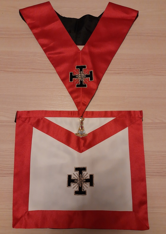 Knight Rose Croix 18°